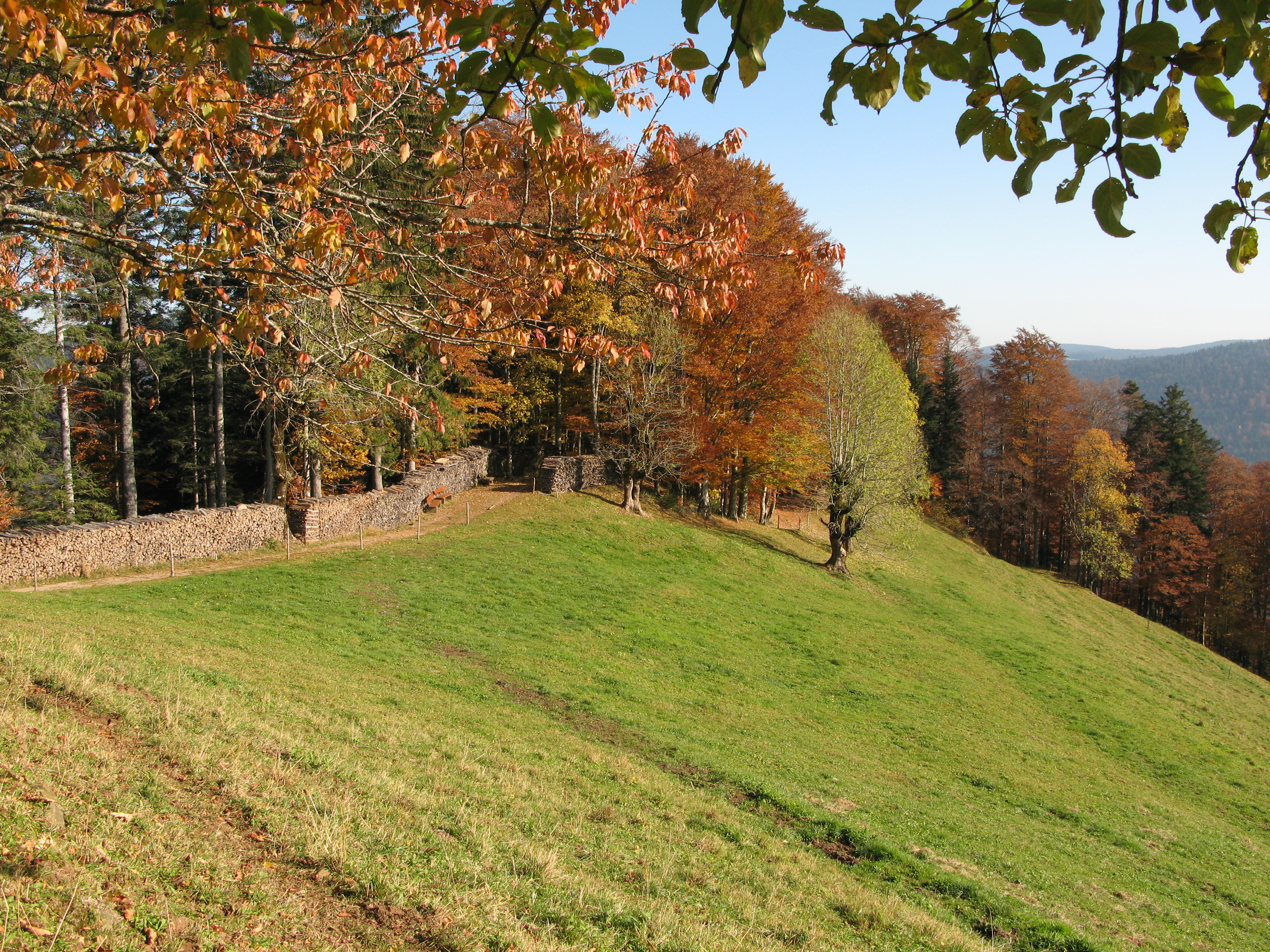 Einstieg zu den Zweribachfällen am unteren Rand der Platte, einer Hochfläche am Kandel im Schwarzwald